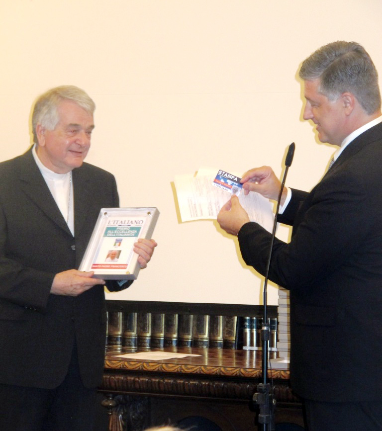 Il direttore editoriale de L'Italiano, Marcelo Bomrad-Casanova, consegna il premio per Papa Francesco al Nunzio Apostolico per l'Argentina, Mons. Emil Paul Tscherrig